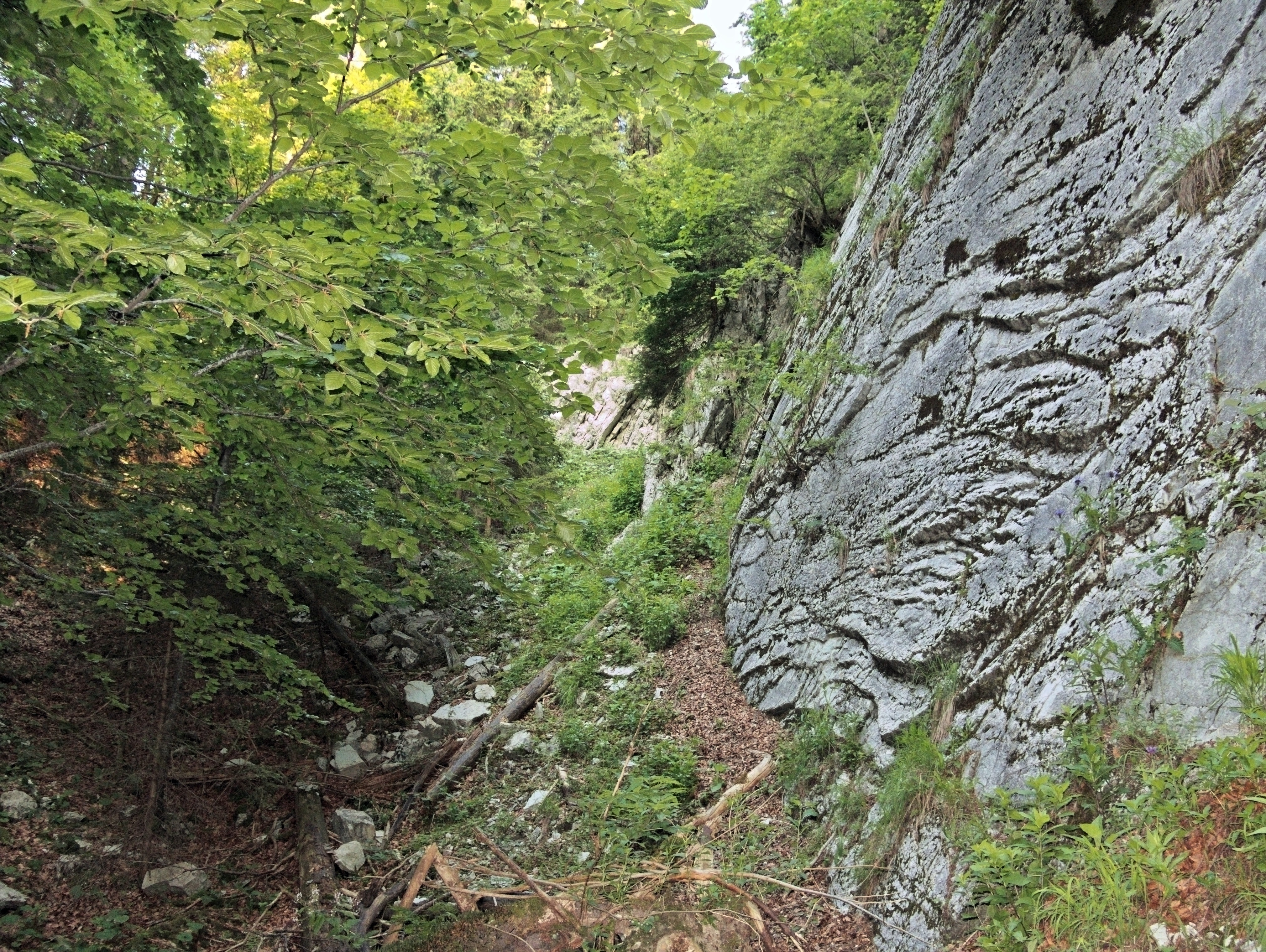 Wetzsteinbrüche bei Unterammergau (Geotop 180G004 des Bayerischen Landesamt für Umwelt )